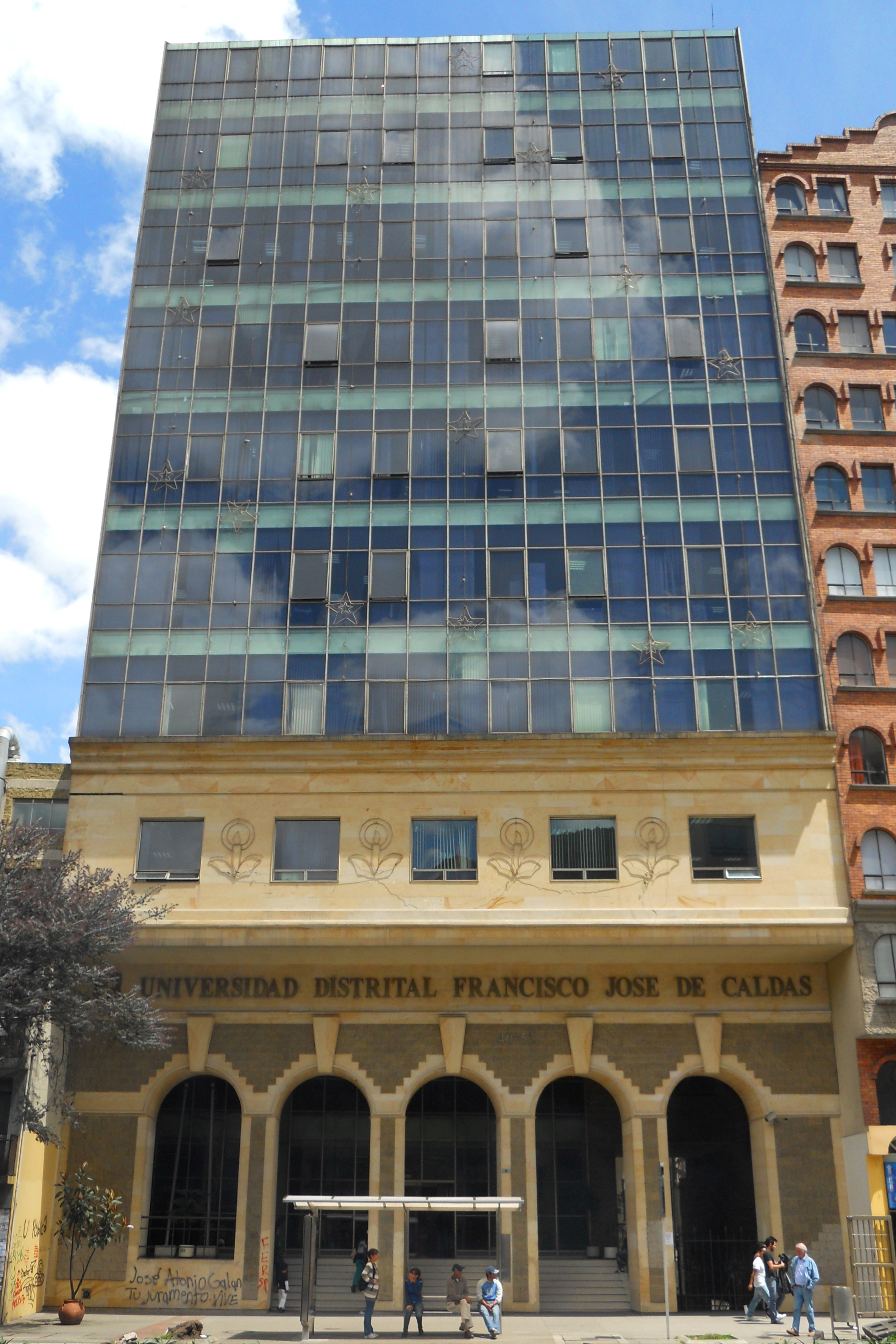 Bogotá Universidad Distrital Francisco José de Caldas, sede carrera Séptima.